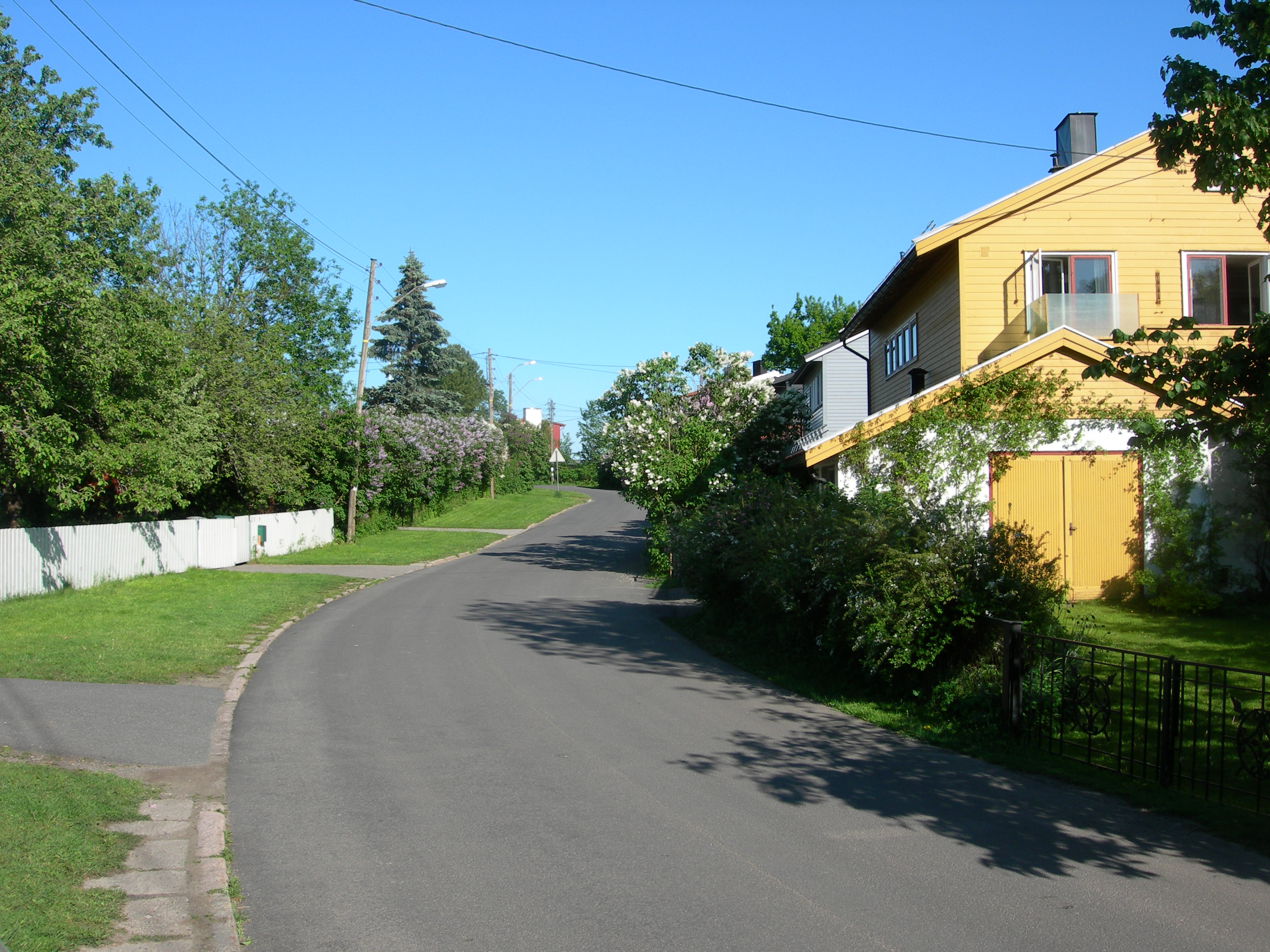 Hamborgveien i Oslo